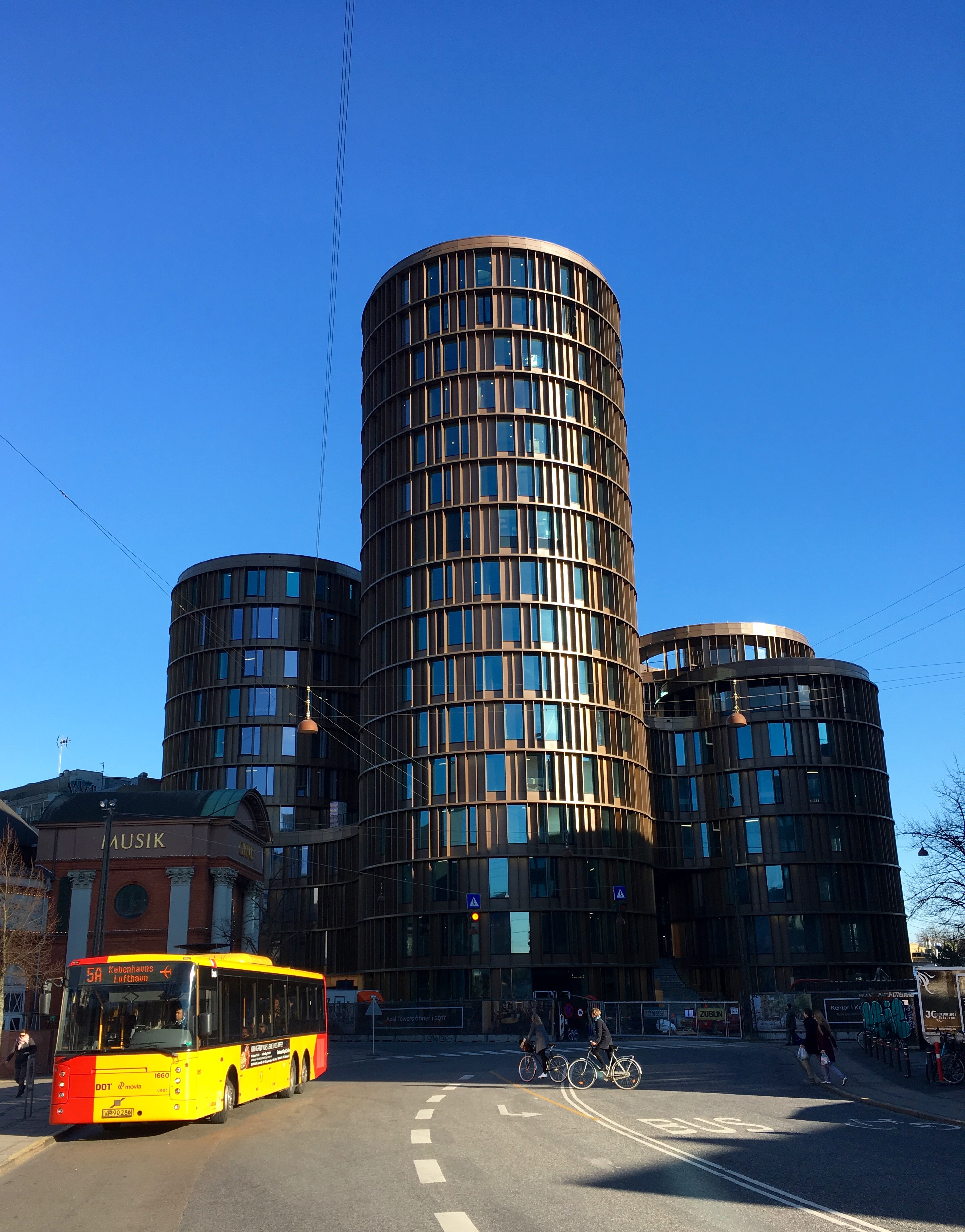 Axel Towers, set fra Jernbanegade, København